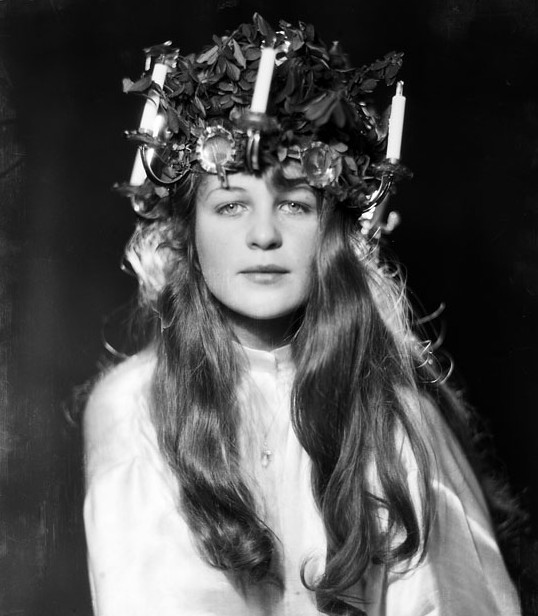 Porträtt av skådespelerskan Solveig Hedengran, klädd som Lucia. Allas Veckotidning: "Luciafirandet som vi känner det satte fart 1928. Margaretas mamma Solveig Hedengran valdes då till Stockholms Lucia och inspirerade hela landet att följa efter. Det snart antika och unika lucialinnet hon bar har följt med i många långa flyttar. [...] I Stockholms Dagblad utsågs Solveig Hedengran till Stockholms Lucia i konkurrens med 200 andra tävlande. I tidningen stod det: ”Segrarinnan måste vara den stockholmska som bäst inkarnerade henne såväl andligt som lekamligt."